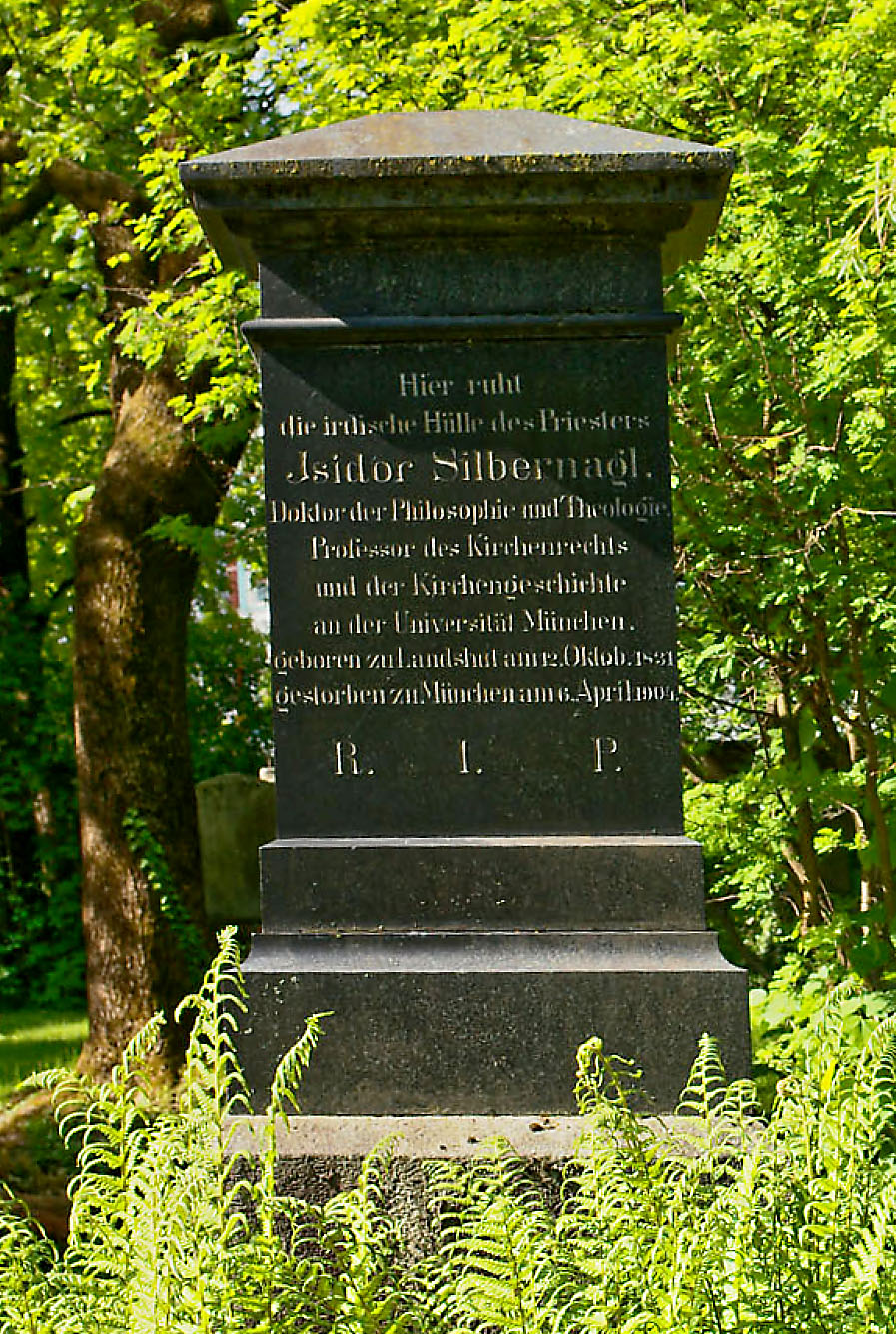 Grab und Grabstein des Theologen Isidor Silbernagl im Münchner Nordfriedhof